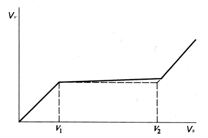 Idealiseeritud AVR-i funktsioon